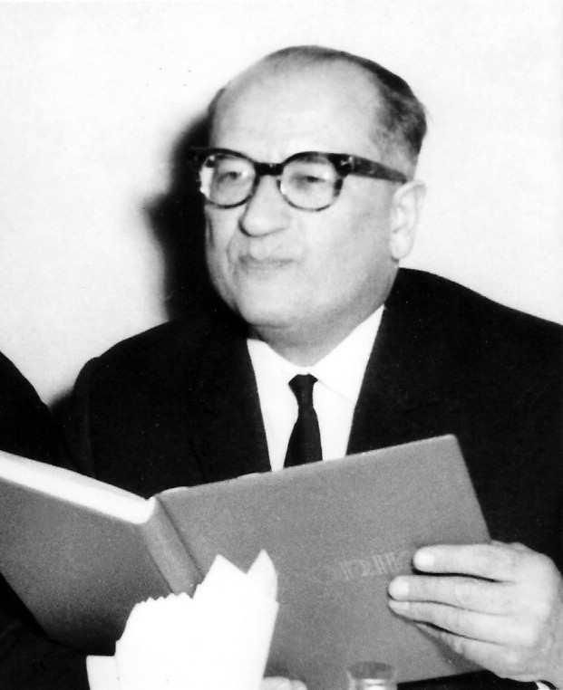 K. Lejman - człowiek Renesansu